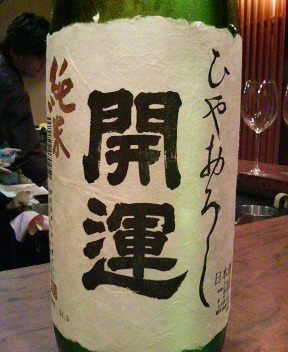 Kaiun Hiyaoroshi Junmaimade by Doi Shuzojo Co., Ltd.